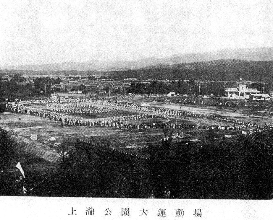 富山県営鉄道上滝公園下駅の由来ともなった上滝公園